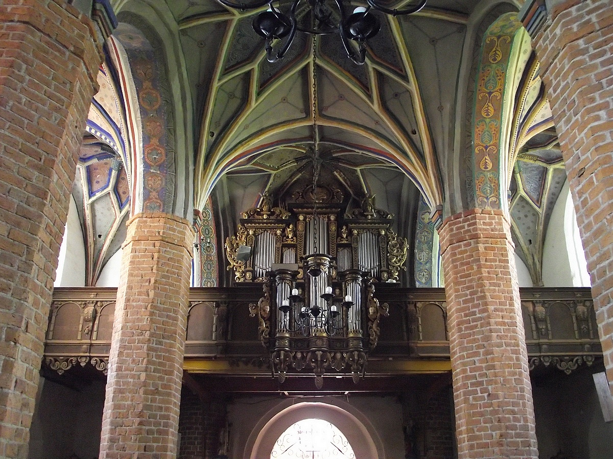 Tuczno, ul. Moniuszki - rzymskokatolicki kościół parafialny p.w. Wniebowzięcia NMP, 1 poł. XV, 1646, XVIII/XIX